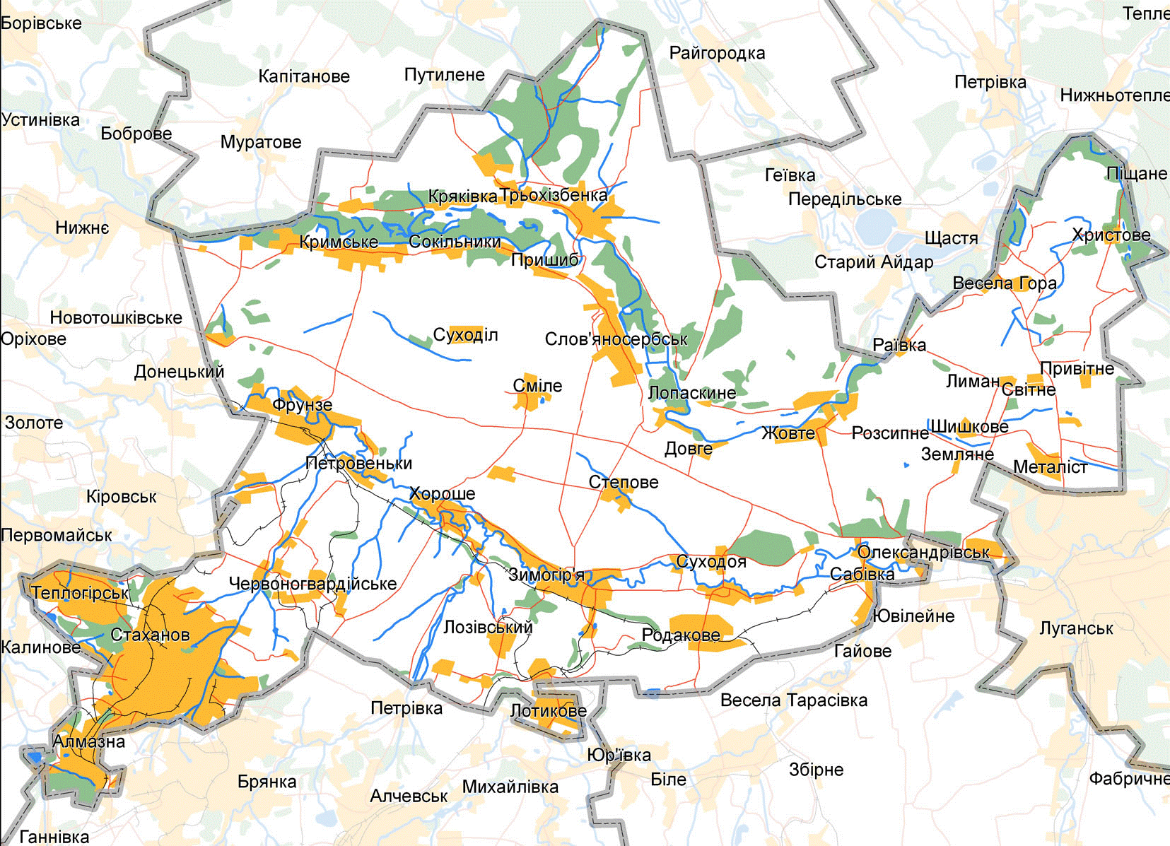 Мапа Слов'яносербського району: Мапа Слов'яносербського району